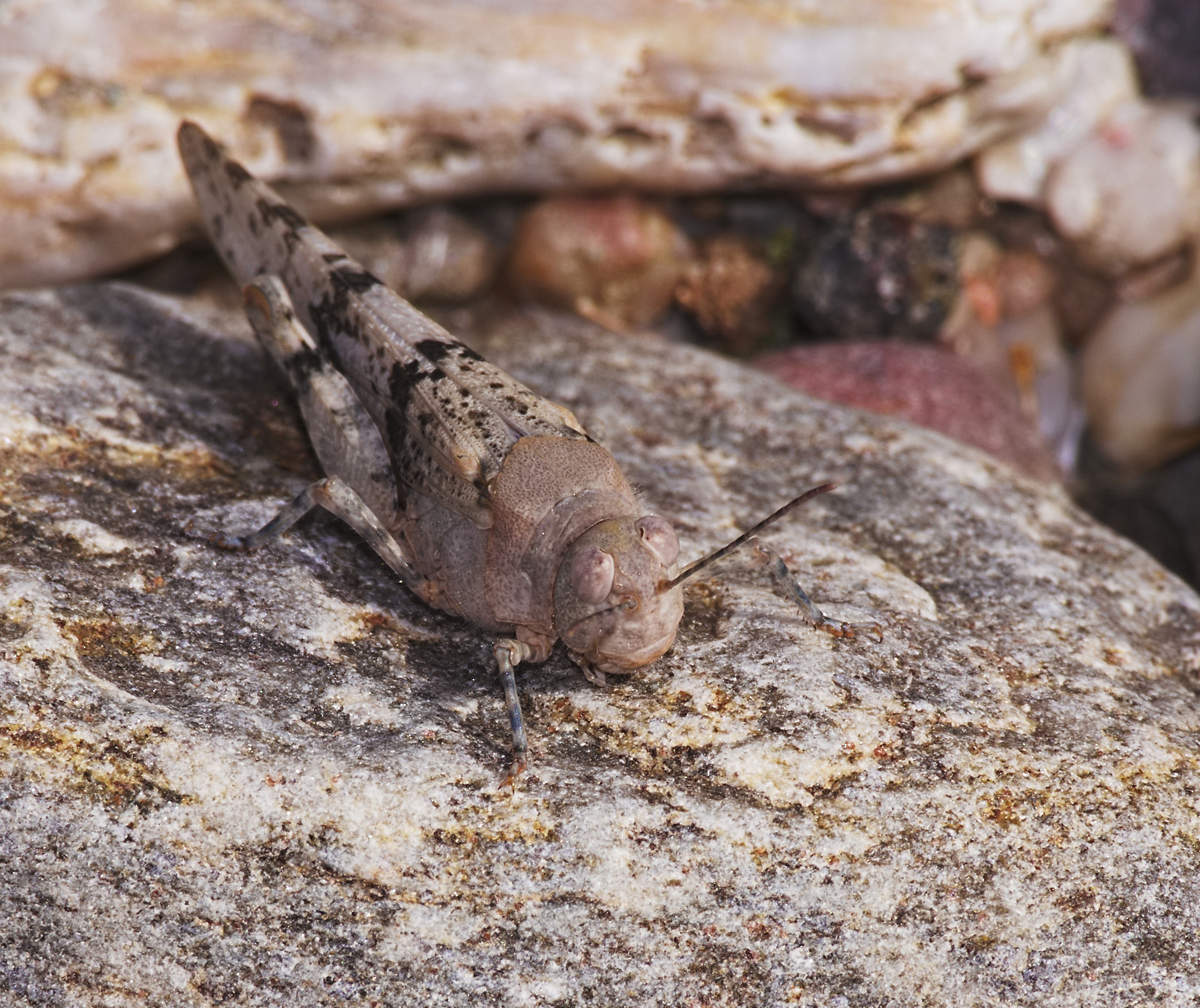 Blauflügelige Sandschrecke - Sphingonotus caerulans. Aufgenommen an der Mulde in Eilenburg, Sachsen, Deutschland.